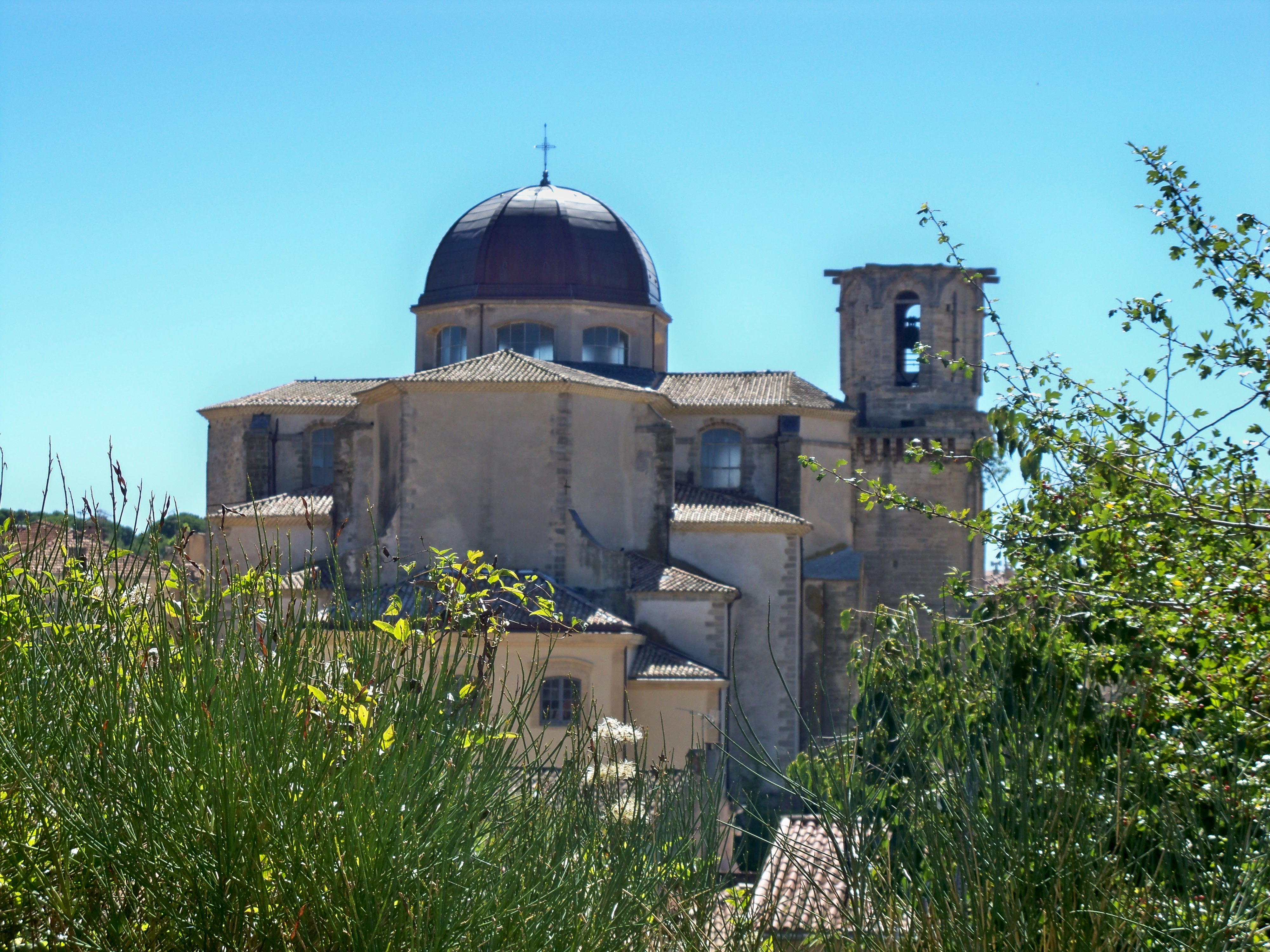 Notre Dame de l'Assomption de Lambesc, Bouche du Rhône, France